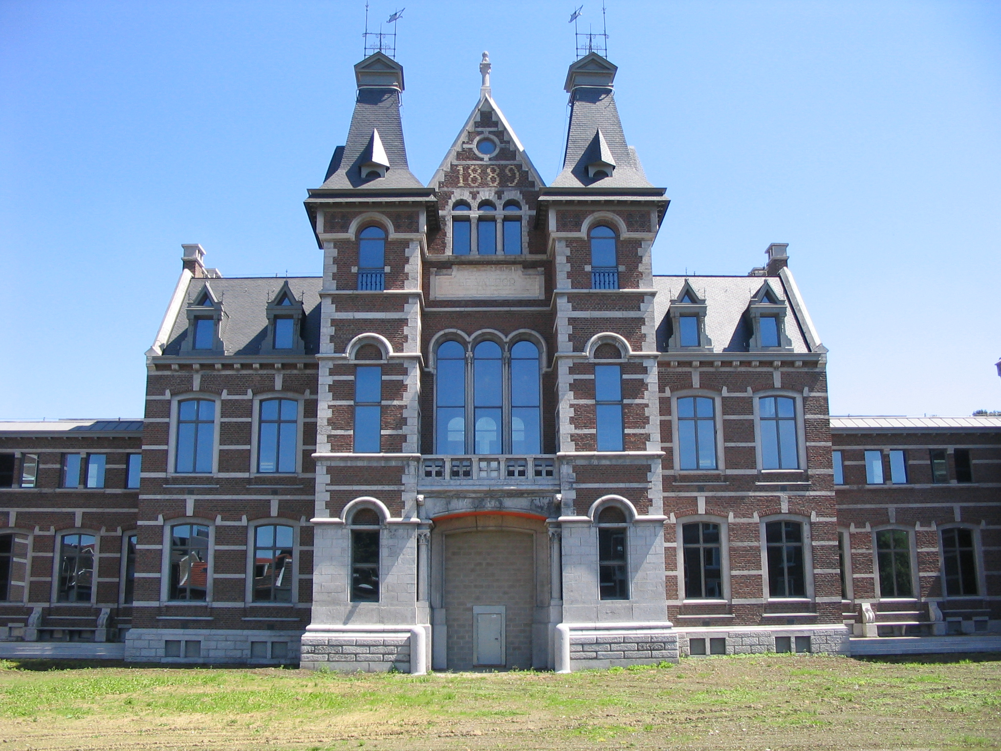 Façade de l'ancien hôpital du Valdor à Liège (Belgique)